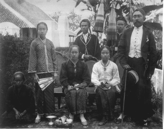 Foto. Bupati Garut Raden Adipati Aria Wiratanudatar VII (?) beserta istri RA Lasminingrat (duduk) dan keluarga.